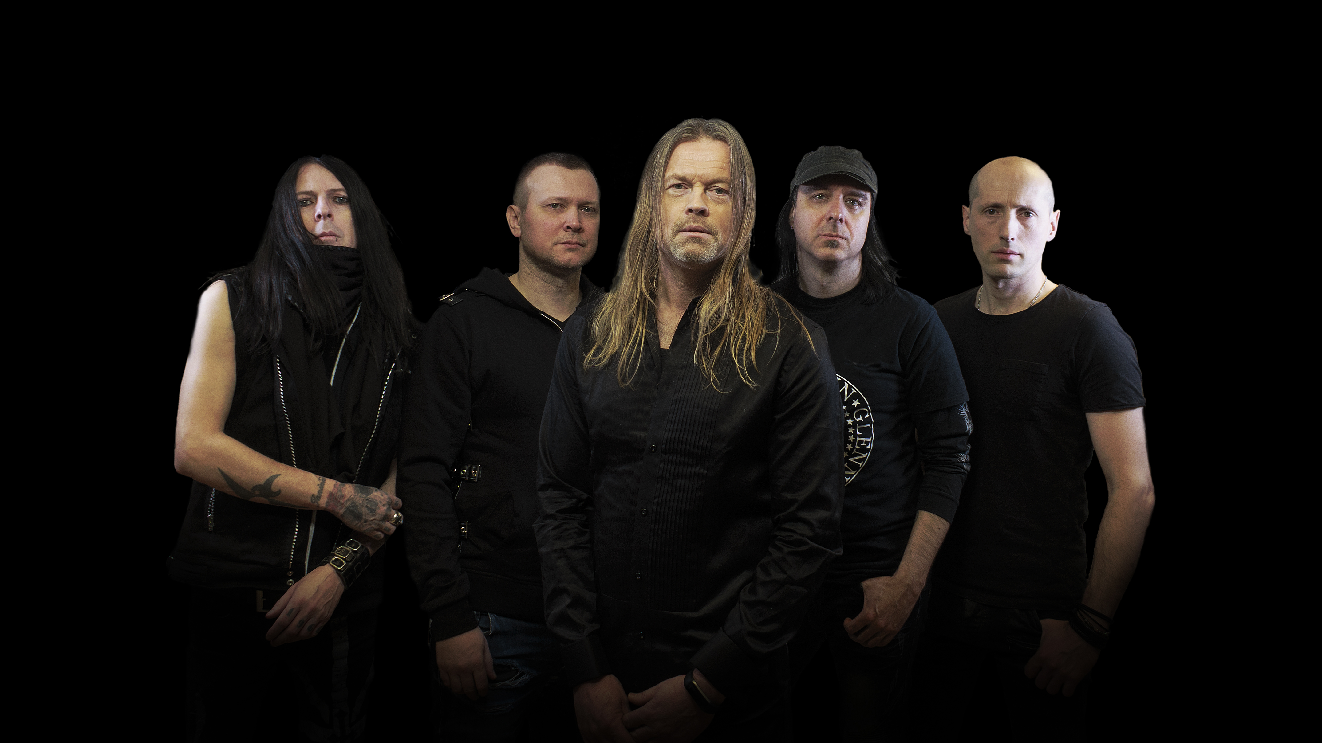 Foto: Oscar Edhagen